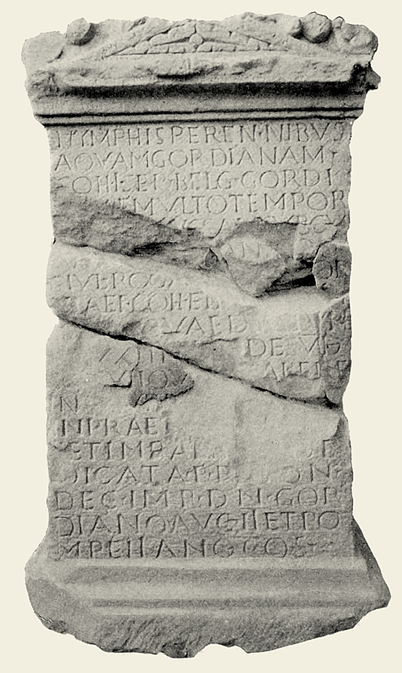 Westkastell Öhringen: Eine der Bauinschriften aus dem Brunnen der Principia; ein Altar für die Nymphen aus dem Jahre 241 n. Chr.